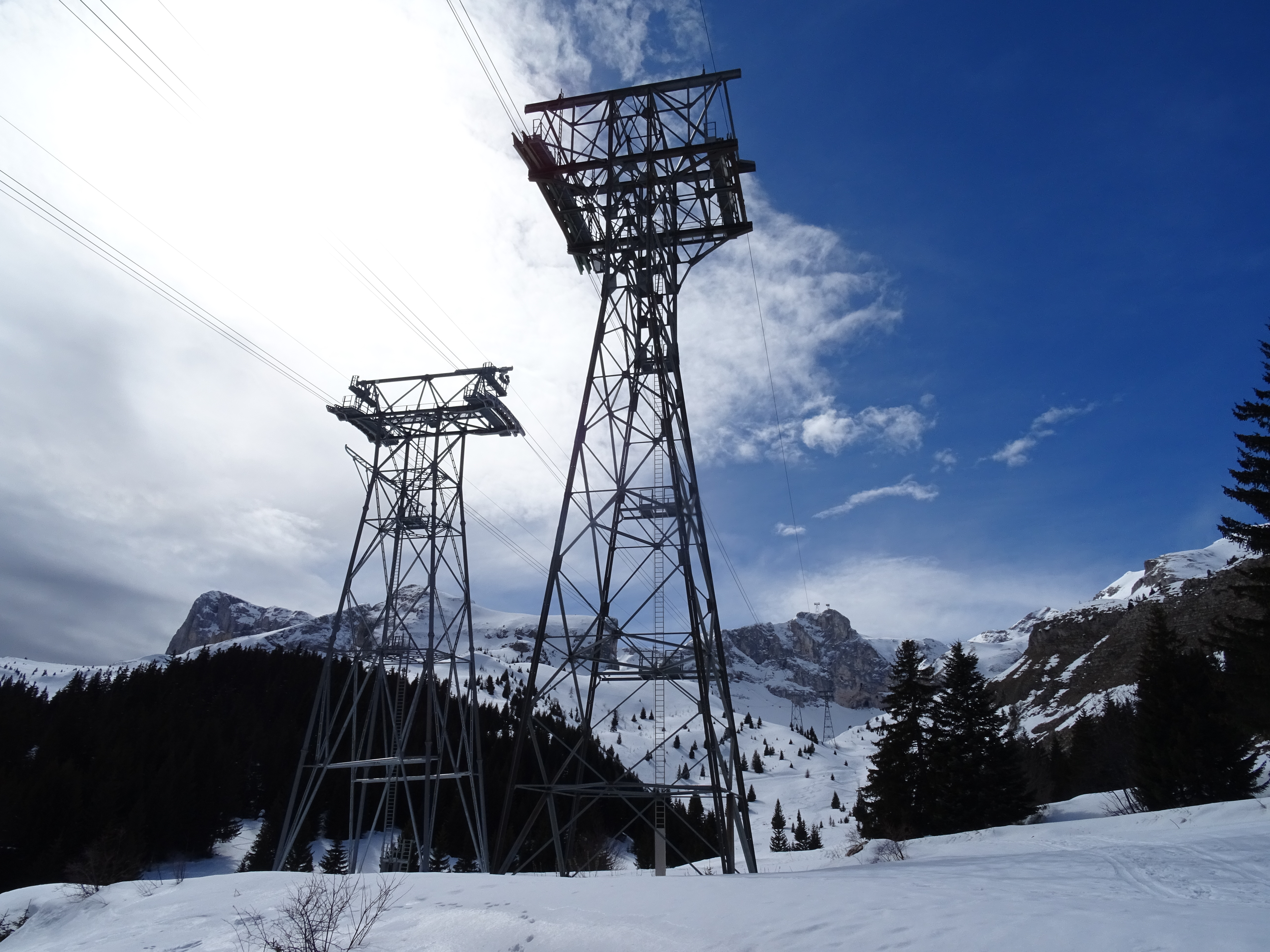 Téléphérique du plateau de Bure- Nouveau (à gauche), ancien (à droite)